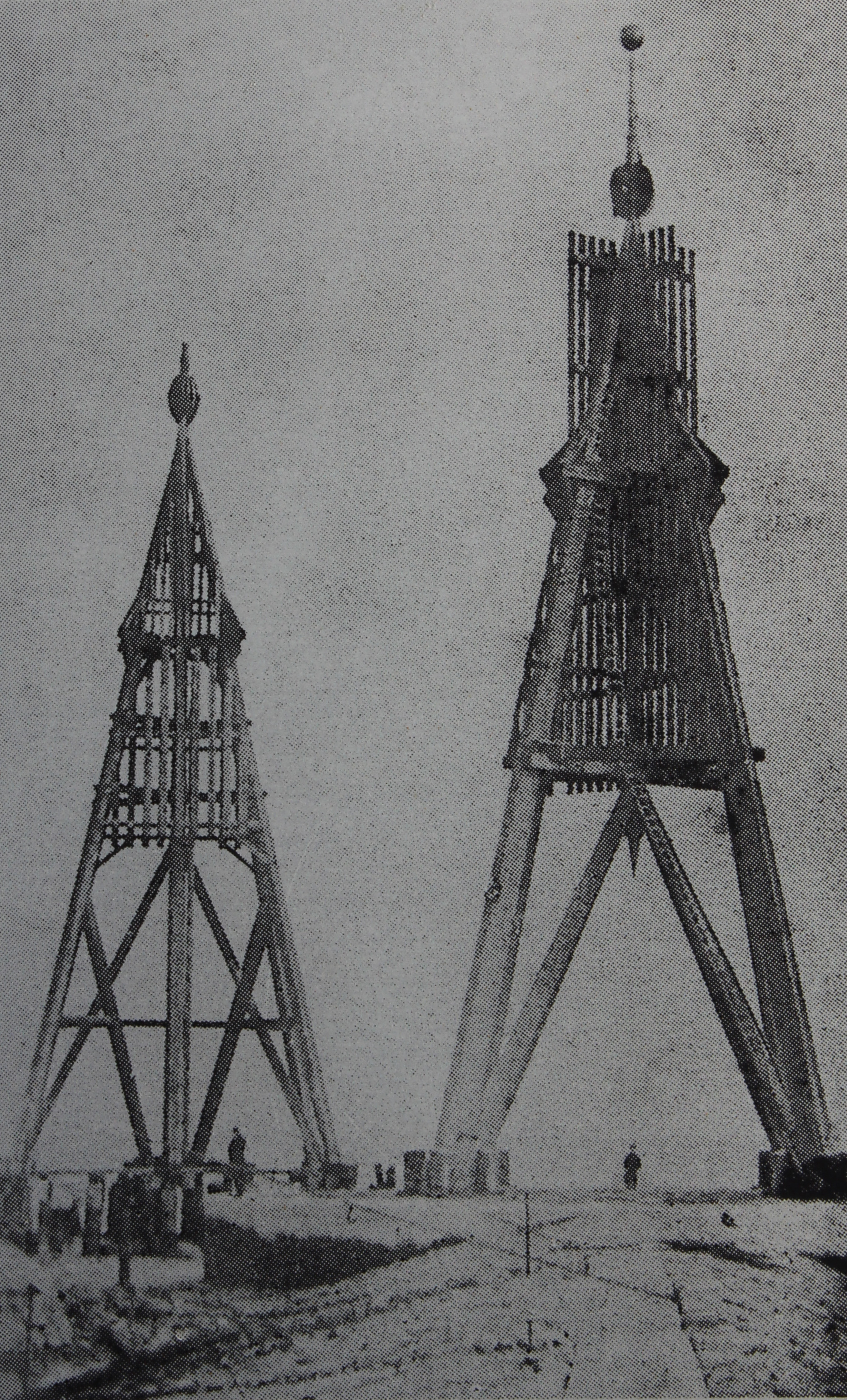 Kugelbake Cuxhaven Quelle Schautafel des Stadtmuseums Cuxhaven bei der Kugelbake